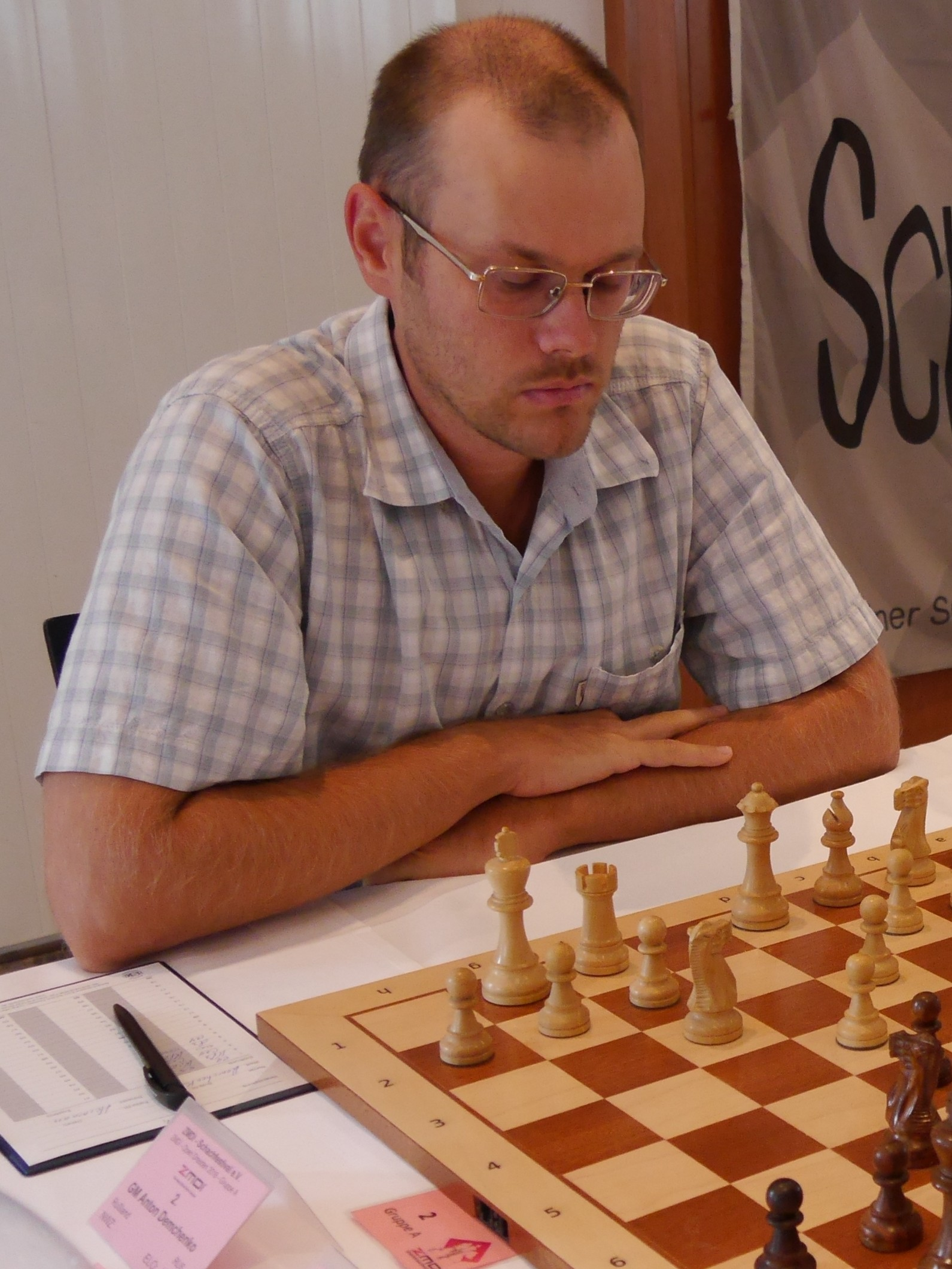 Anton Demchenko, ZMDI Schachfestival 2016 in Dresden.